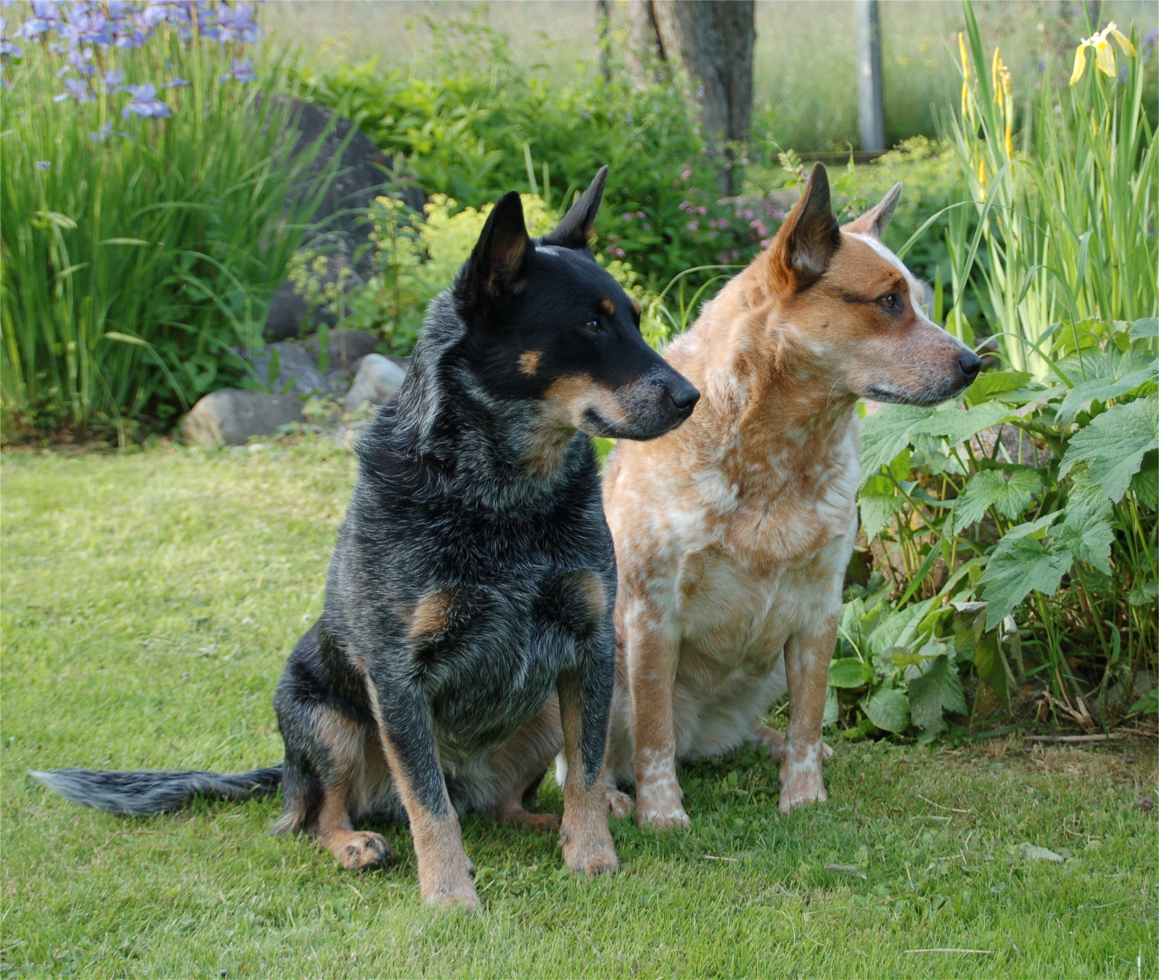 Australian Cattle Dogs „Multi Ch. Silveraurora's Super Mask“ und „Ch.MK Avednigo“